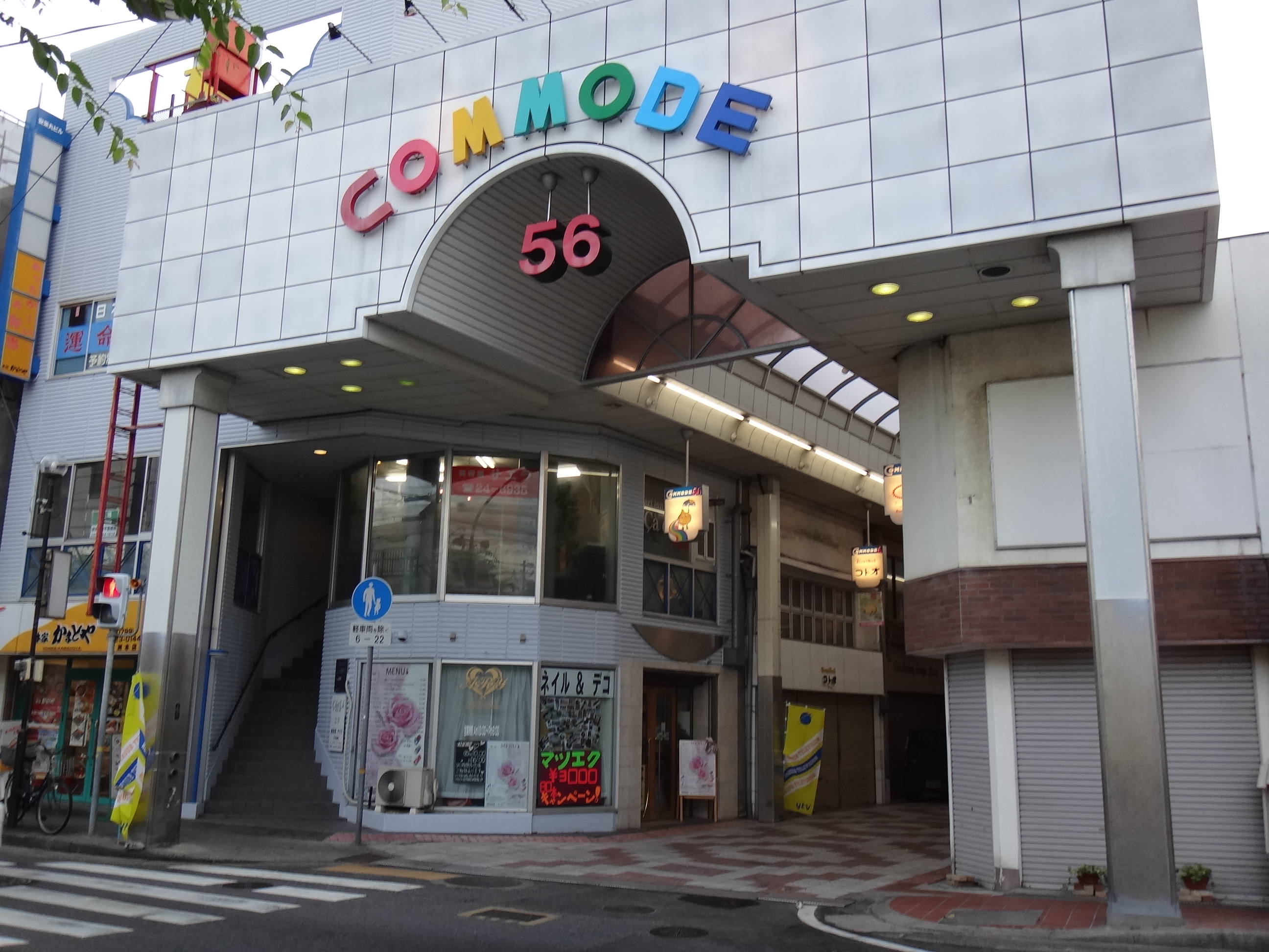 兵庫県洲本市にある商店街「コモード５６」